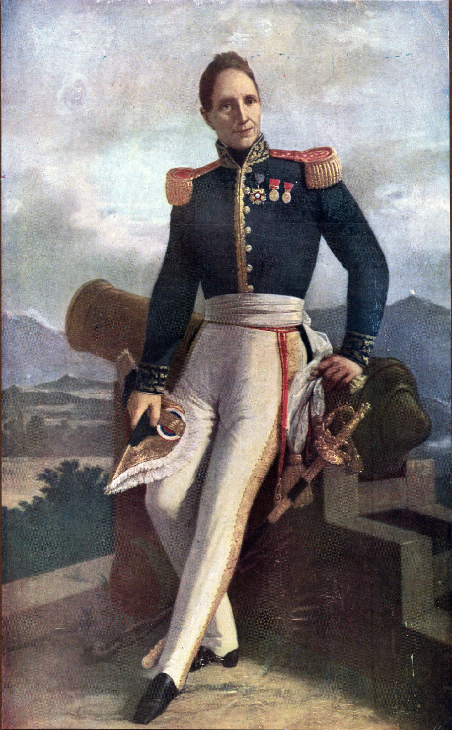 José Manuel Borgoño Núñez y Silva (Petorca; 1792 – 29 de marzo de 1848) Militar chileno, ocupo en dos ocasiones el ministerio de guerra.